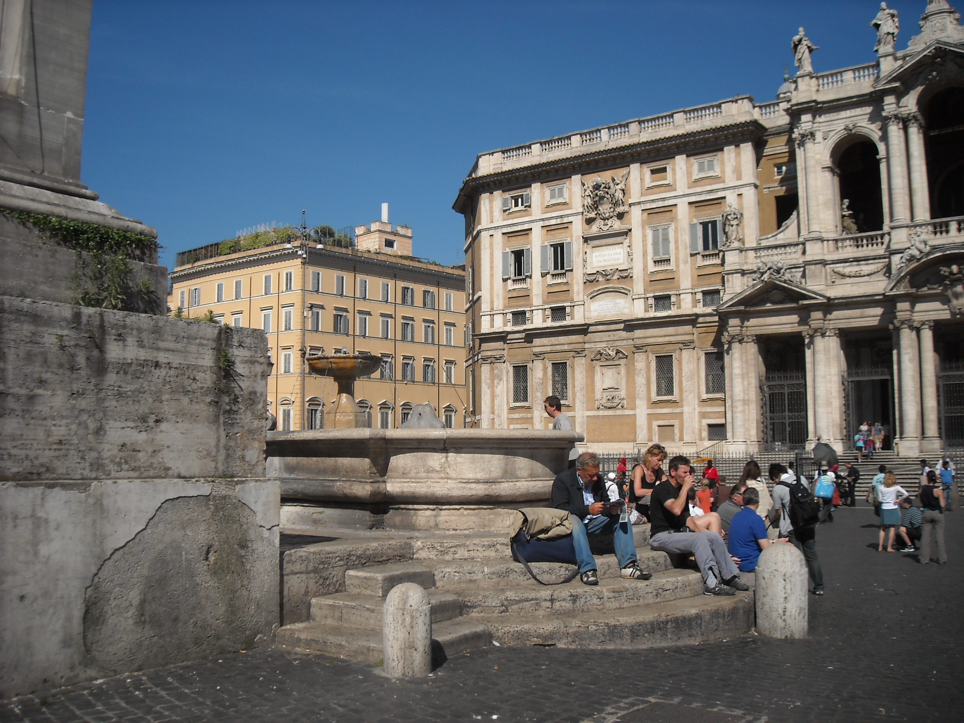 La fontana di piazza Santa Maria Maggiore in Roma